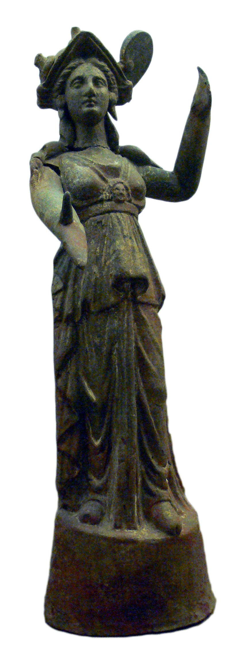 Athena. Museum in Pella